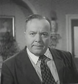 L'attore e doppiatore Vinicio Sofia